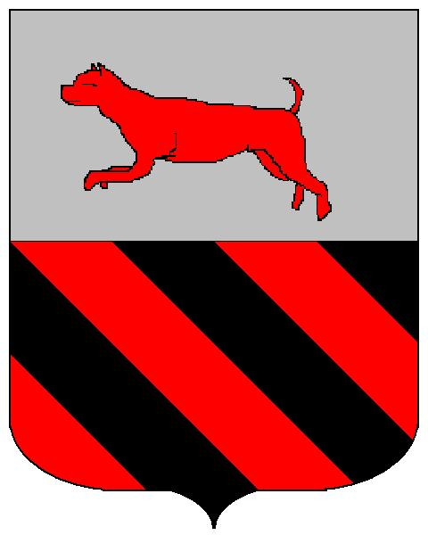 Grb obitelji Cindro